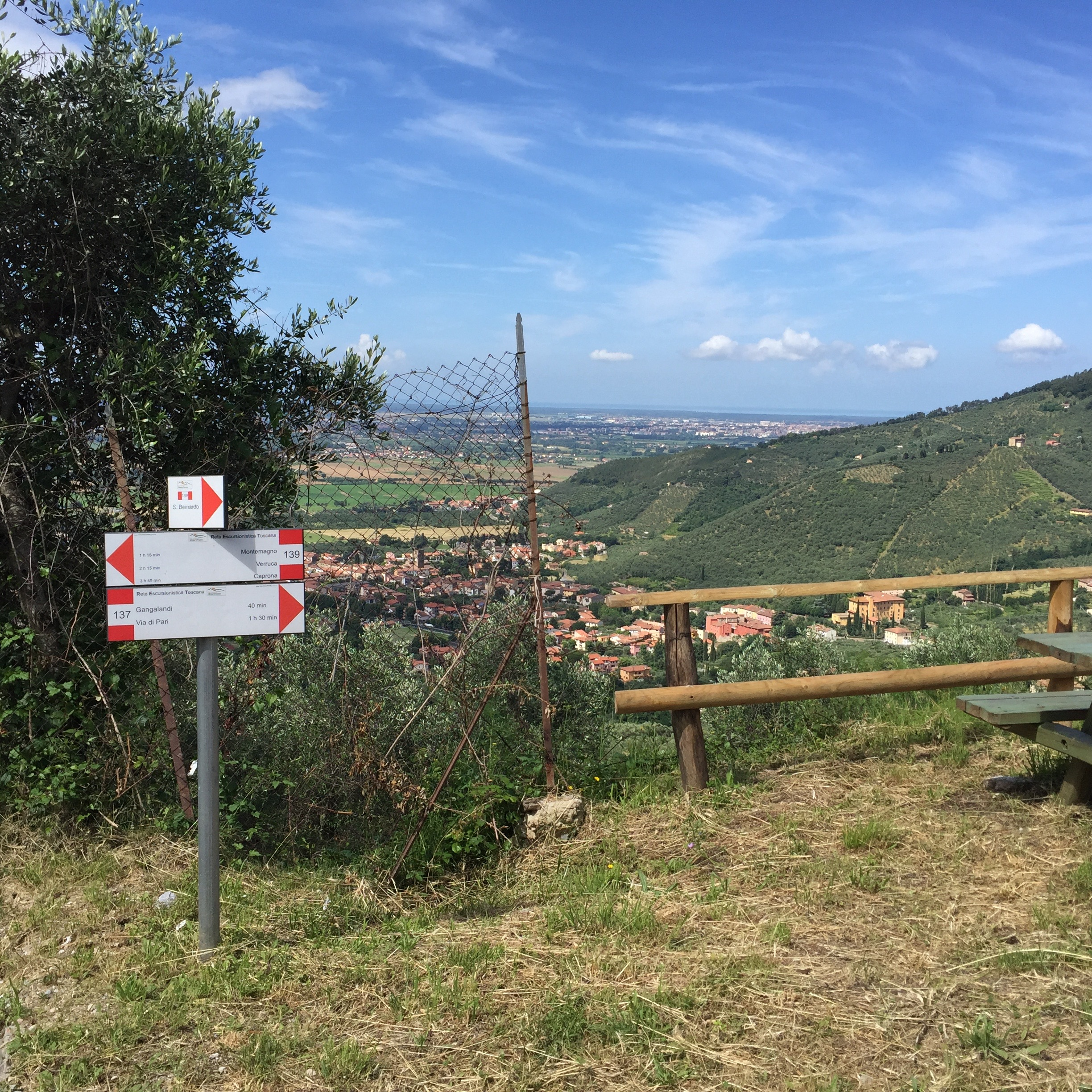 Segnaletica verticale del Montepisano. Incrocio sentieri RET 137 e 139 nei pressi di San Bernardo